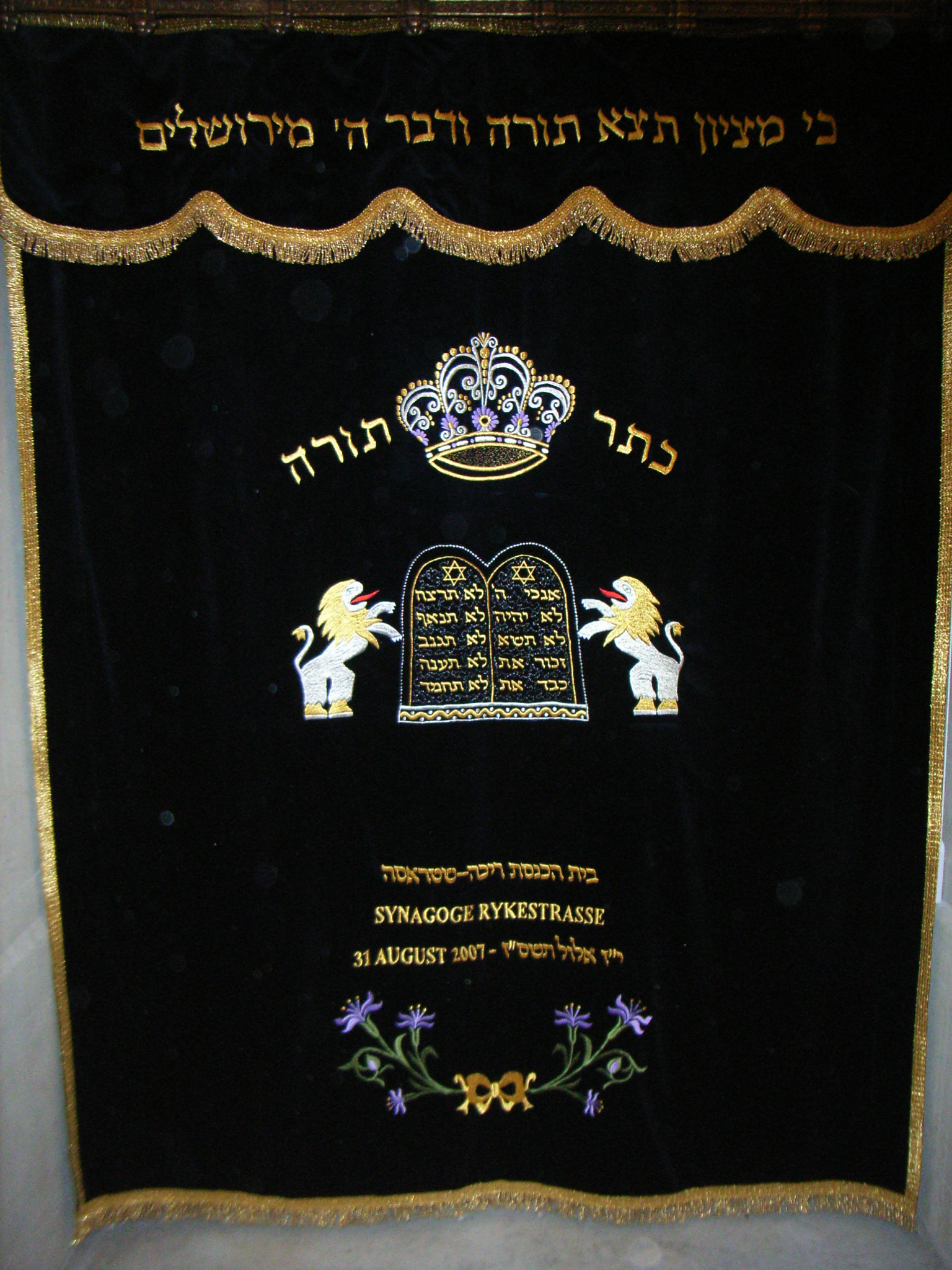 Synagoge Rykestraße in Berlin-Prenzlauer Berg (Deutschland), Tuch vor Toraraum